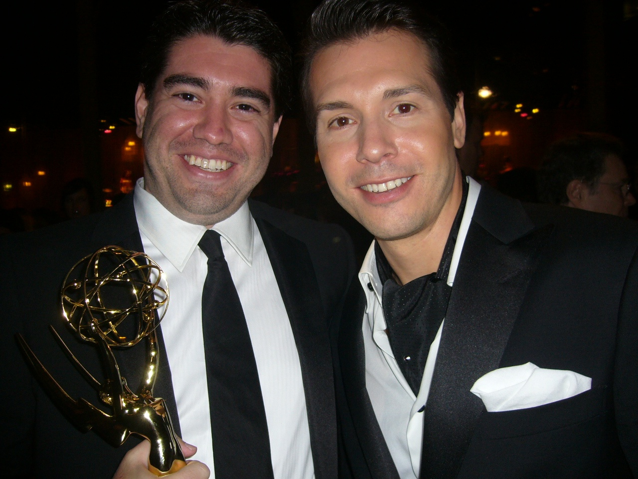 Ator Jonathan Seda